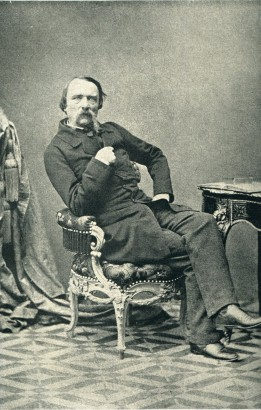 Christian Ruben (1805 - 1875), Rakouský malíř, kreslíř a pedagog.